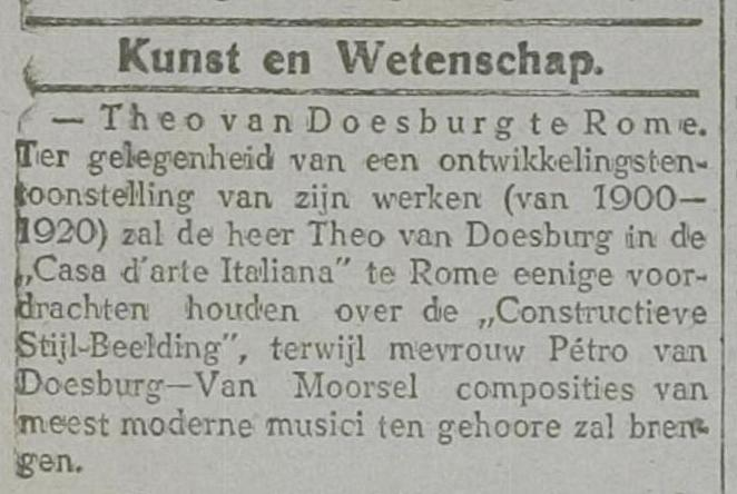 'Theo van Doesburg in Rome', Amersfoortsch Dagblad „De Eemlander”, 19e jg., nr. 228 (30 maart 1921): p. 3.